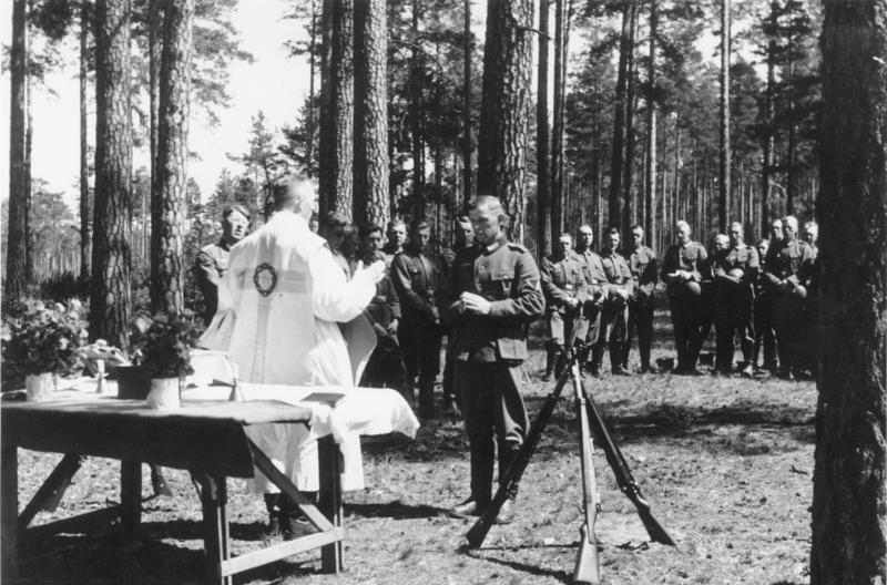 Kality/Opr. 2.6.41 Feldgottesdienst für deutsche Soldaten; der Feldgeistliche erteilt den Segen Bildberichter Henisch; Prop. Kp. 612 Nr. 15/1981